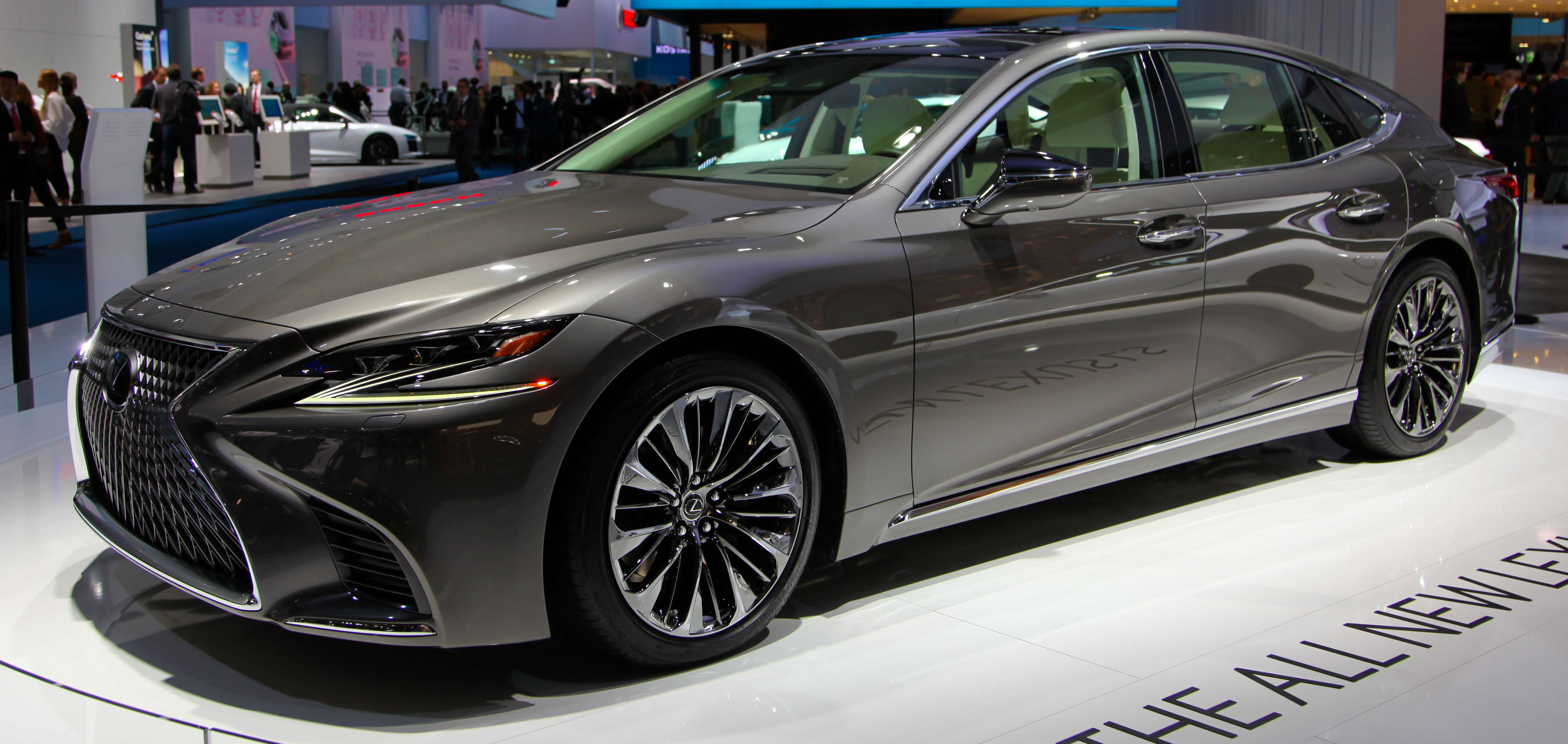 Lexus LS auf der IAA 2017